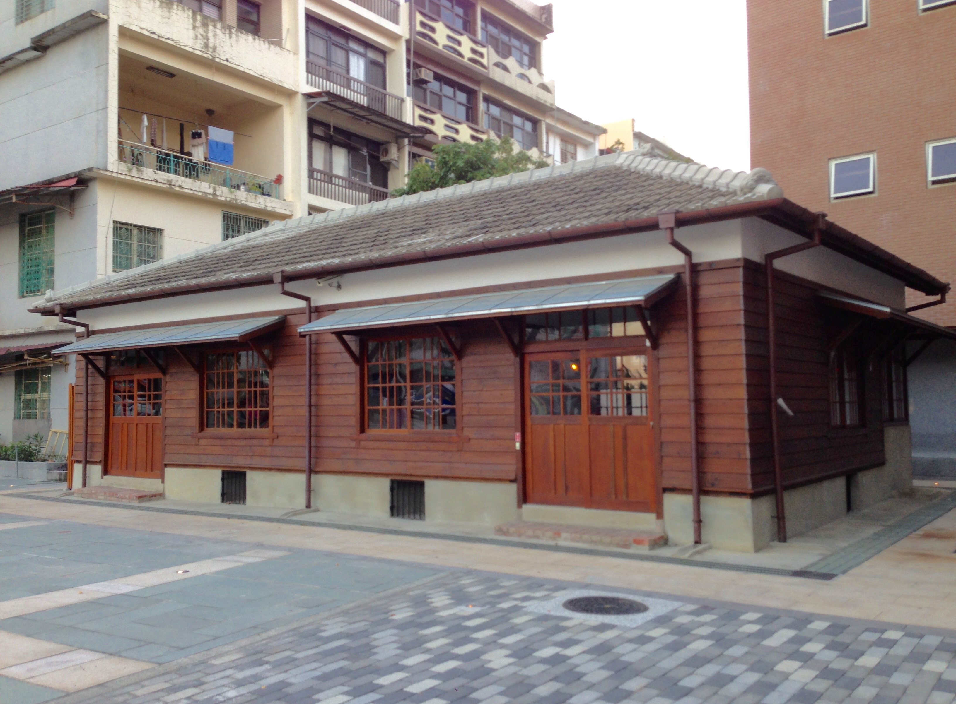 美濃警察分駐所宿舍